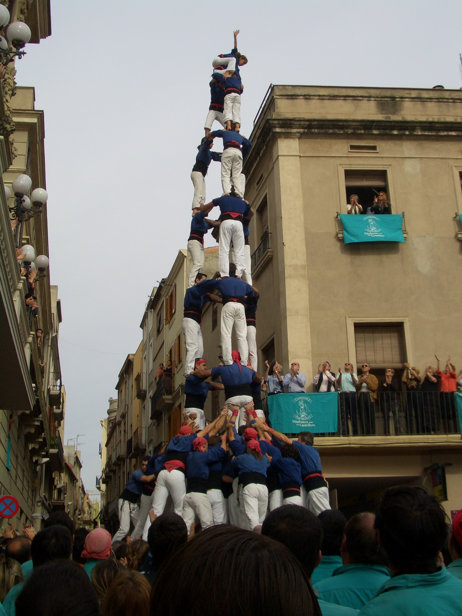 Colla Castellera Capgrossos de Mataró a Vilafranca del Penedès